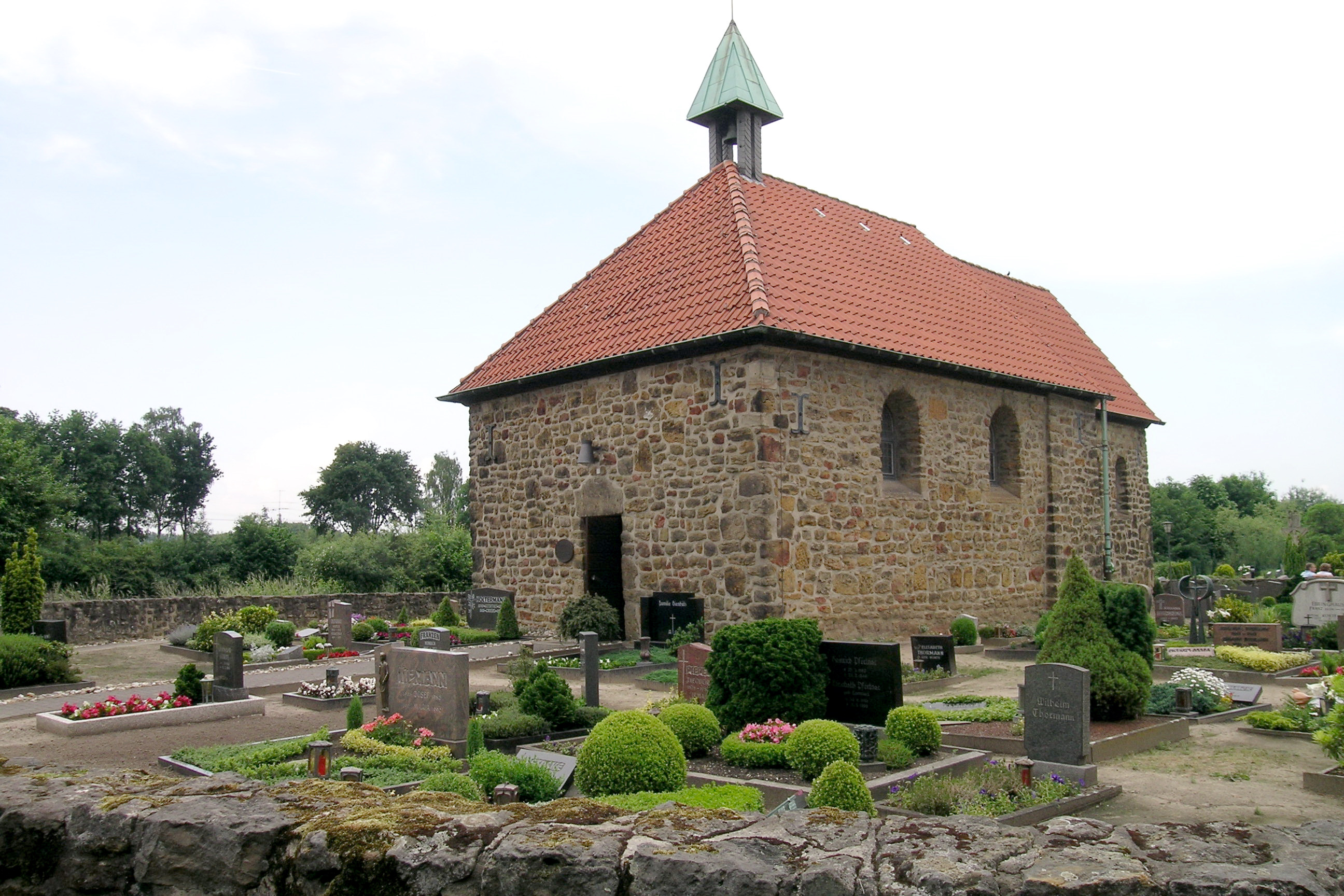 Katharinenkapelle am Kanal in Haltern